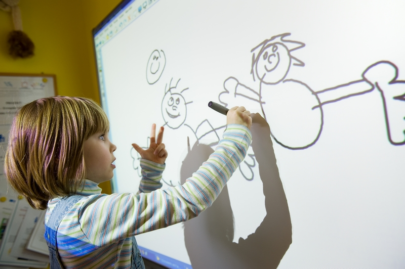 Projekt finacovaný z OP VK